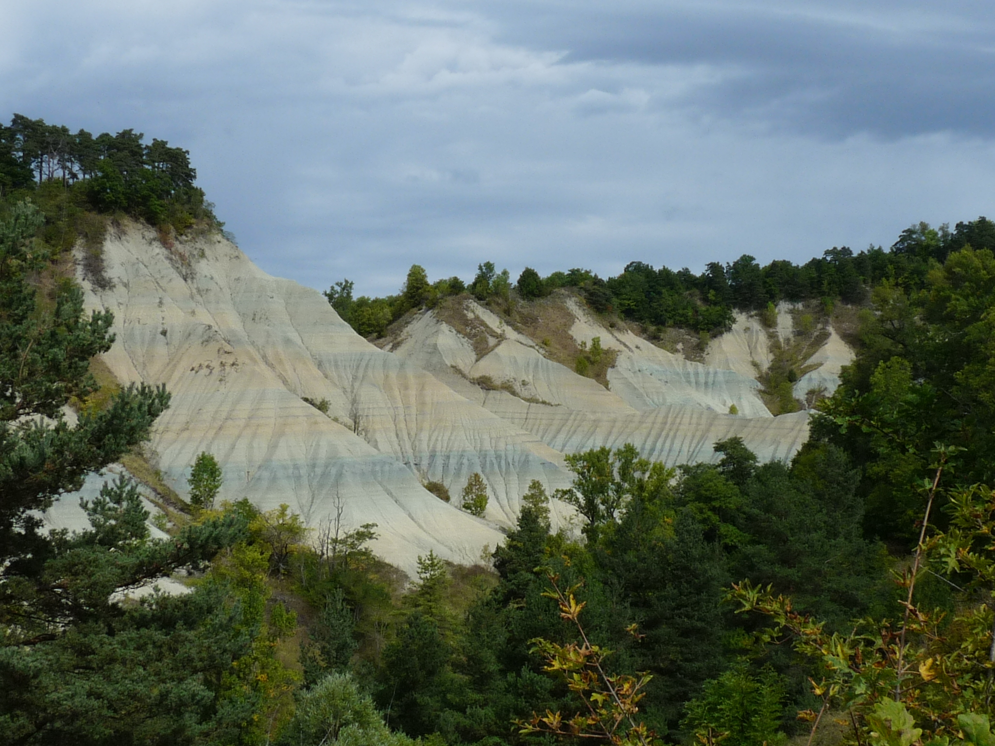 Die Felsenschlucht Ravin de Corboeuf in der Gemeinde Rosières (Haute-Loire)